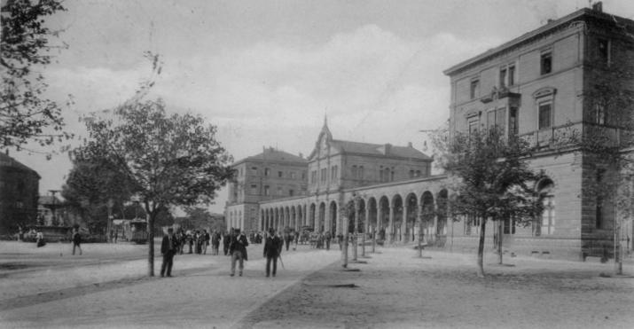 Alter Hauptbahnhof in Heilbronn